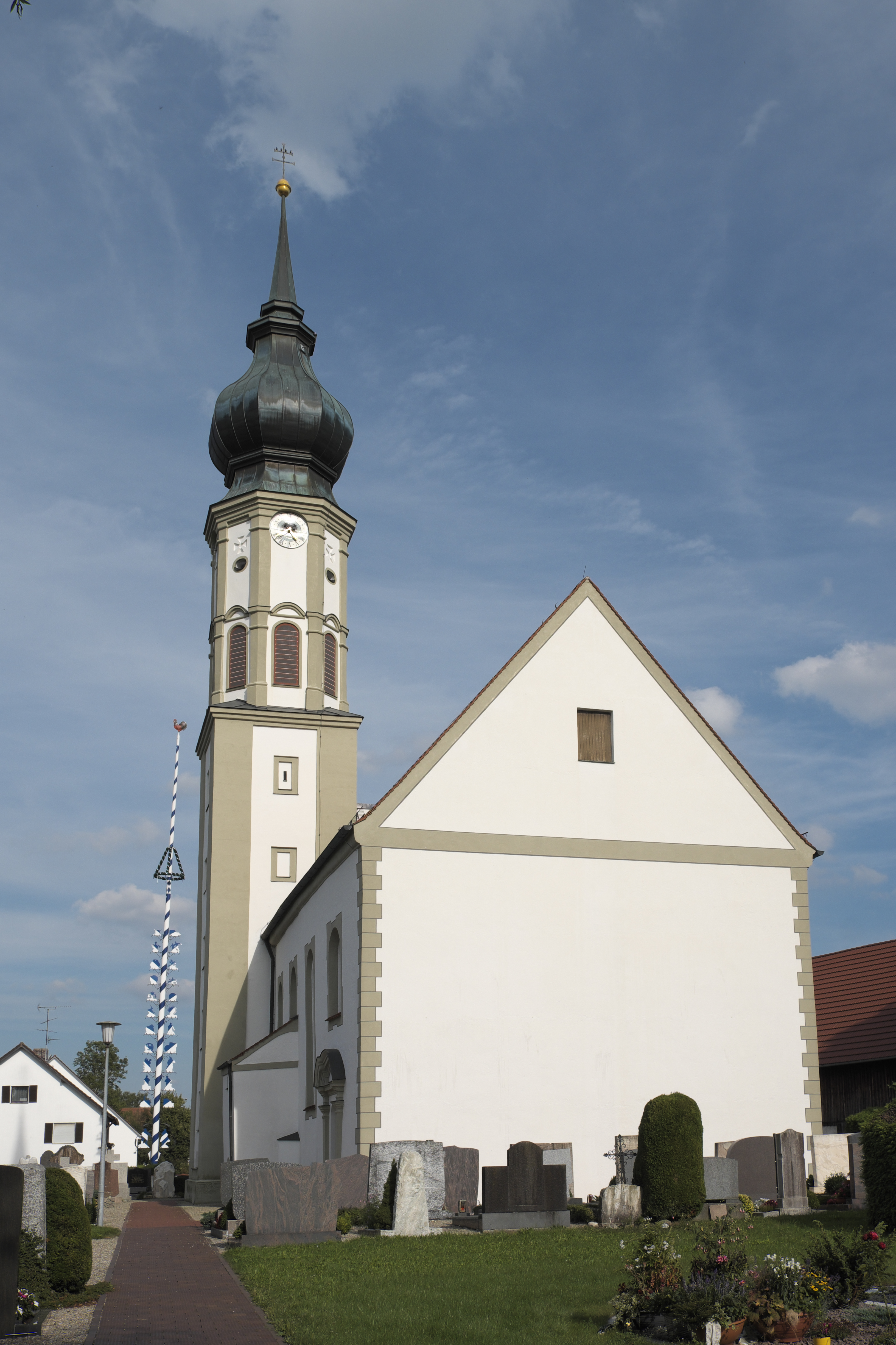 Katholische Pfarrkirche Hl. Kreuz in Schwabhausen bei Landsberg, einem Ortsteil von Weil (Oberbayern) im Landkreis Landsberg am Lech (Bayern/Deutschland)